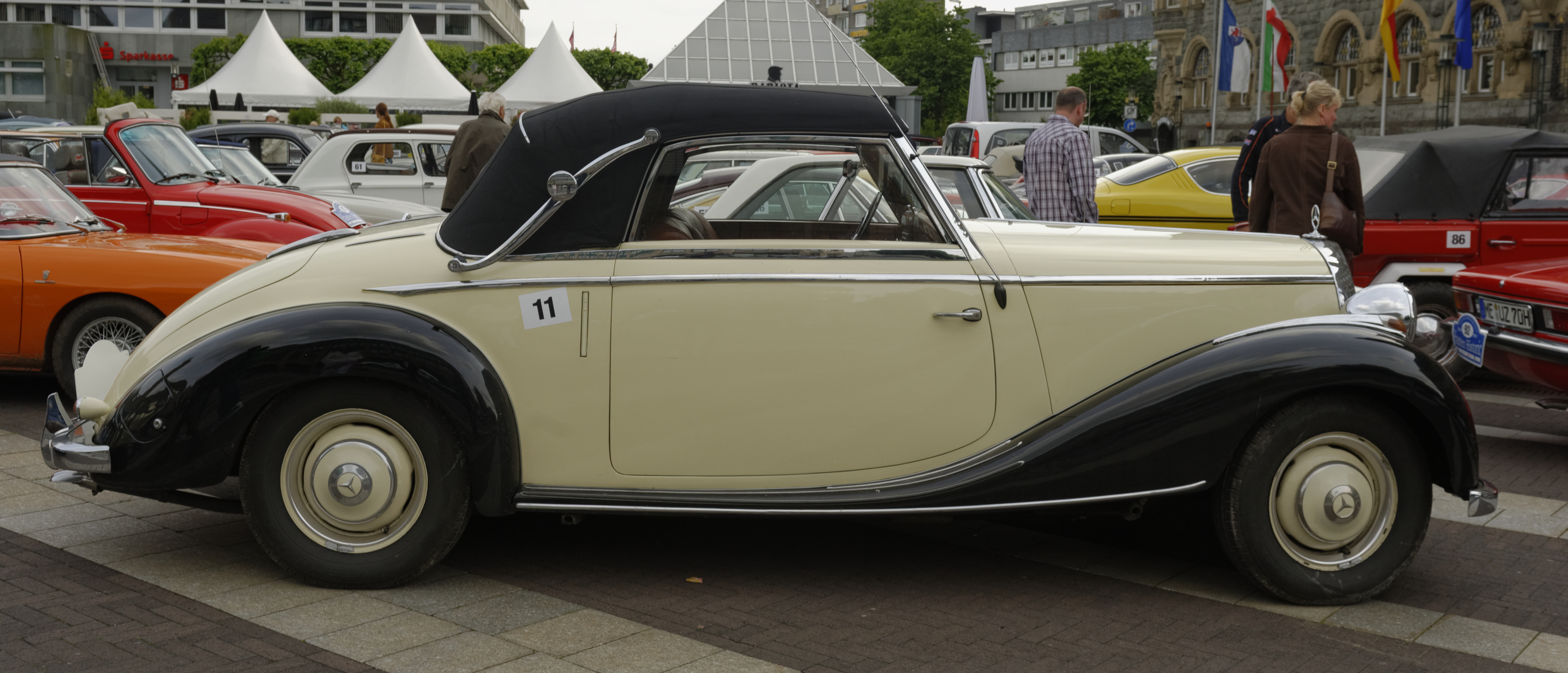 Oldtimershow in Remscheid Juni 2013